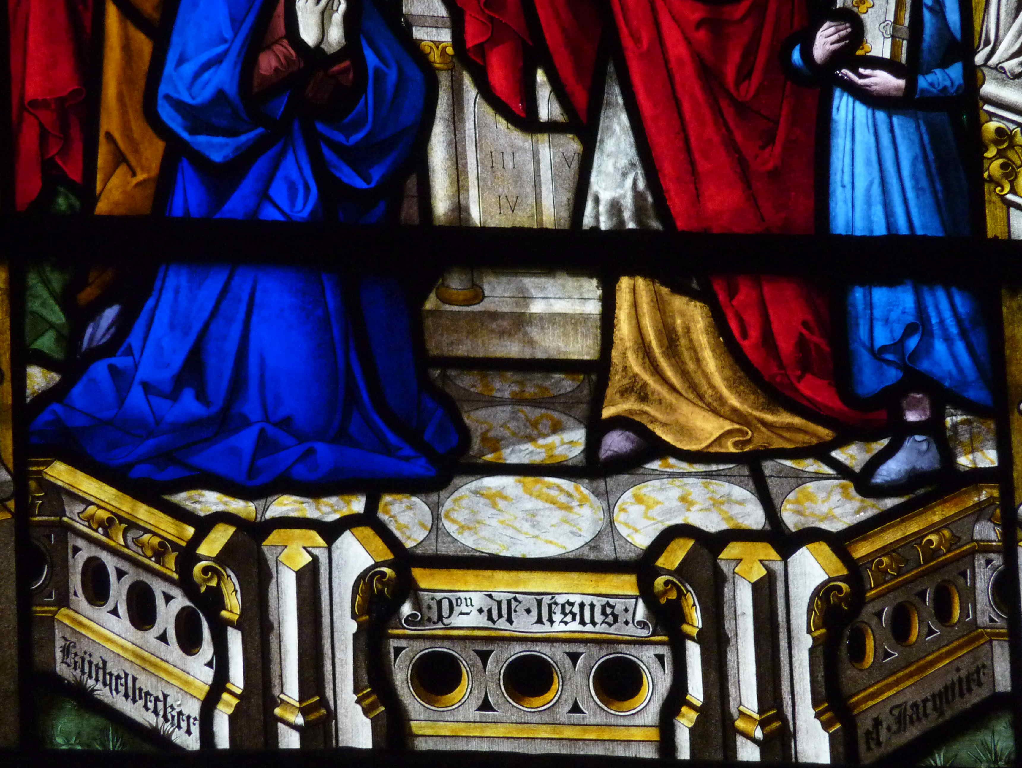 Katholische Kirche Saint-Pierre in Dreux im Département Eure-et-Loir (Centre-Val de Loire/Frankreich), Bleiglasfenster in der Kapelle Notre-Dame de Pitié, mit Signatur: Küchelbecker N. Jacquier Le Mans 1885; Darstellung: Szenen aus dem Leben Jesu; Signatur (Ausschnitt)